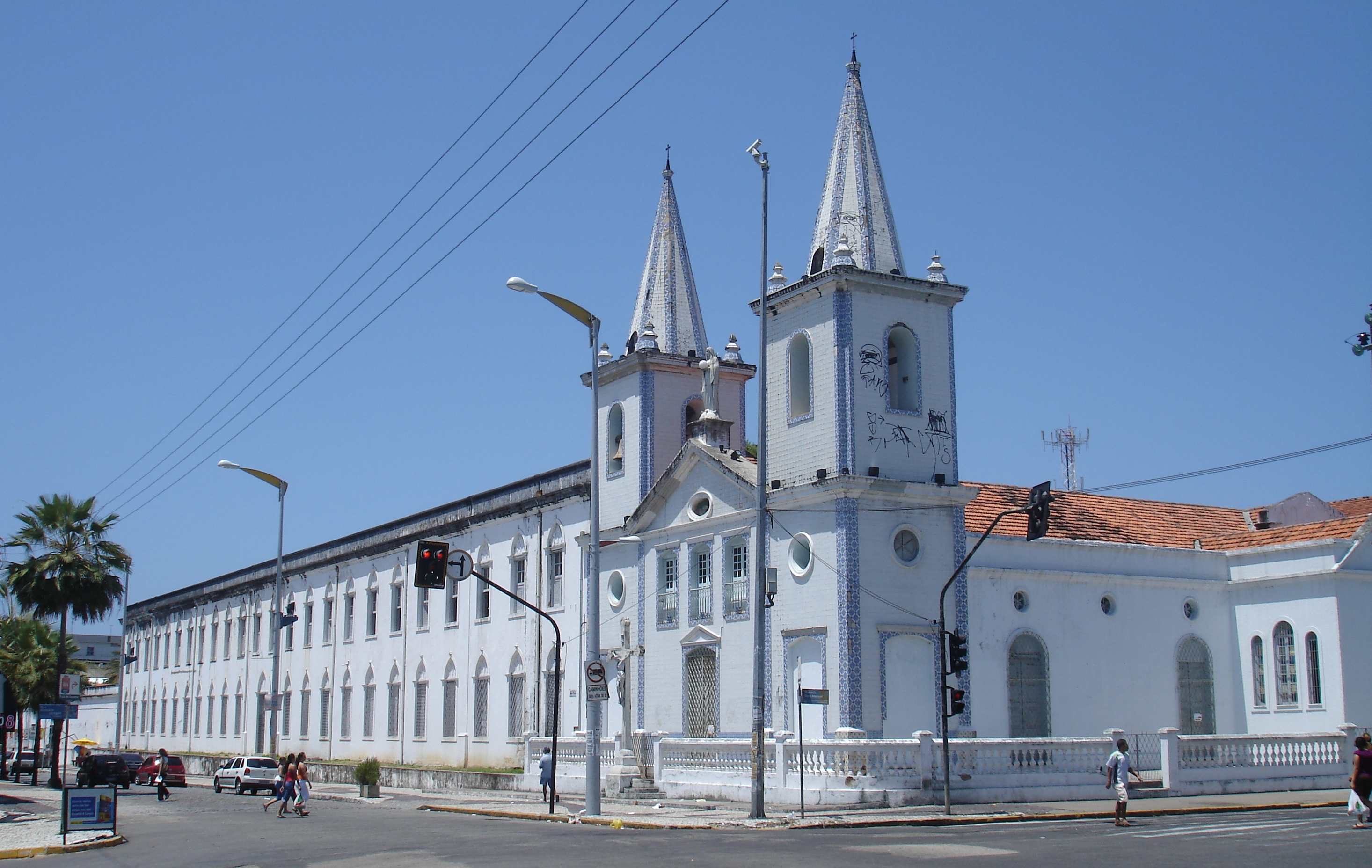 Seminário da Prainha, Fortaleza, Ceará, Brazil